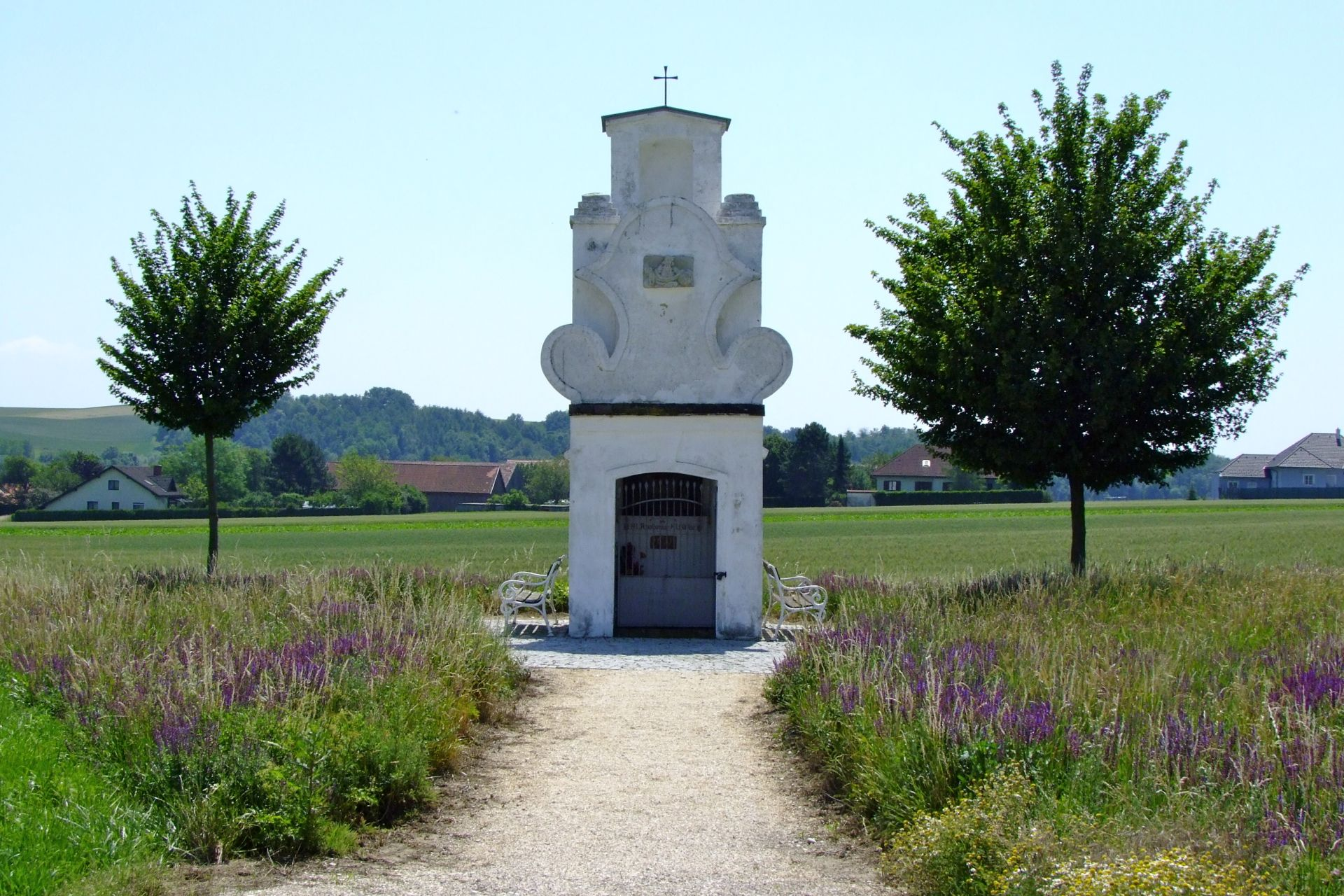 Apolloniakapelle